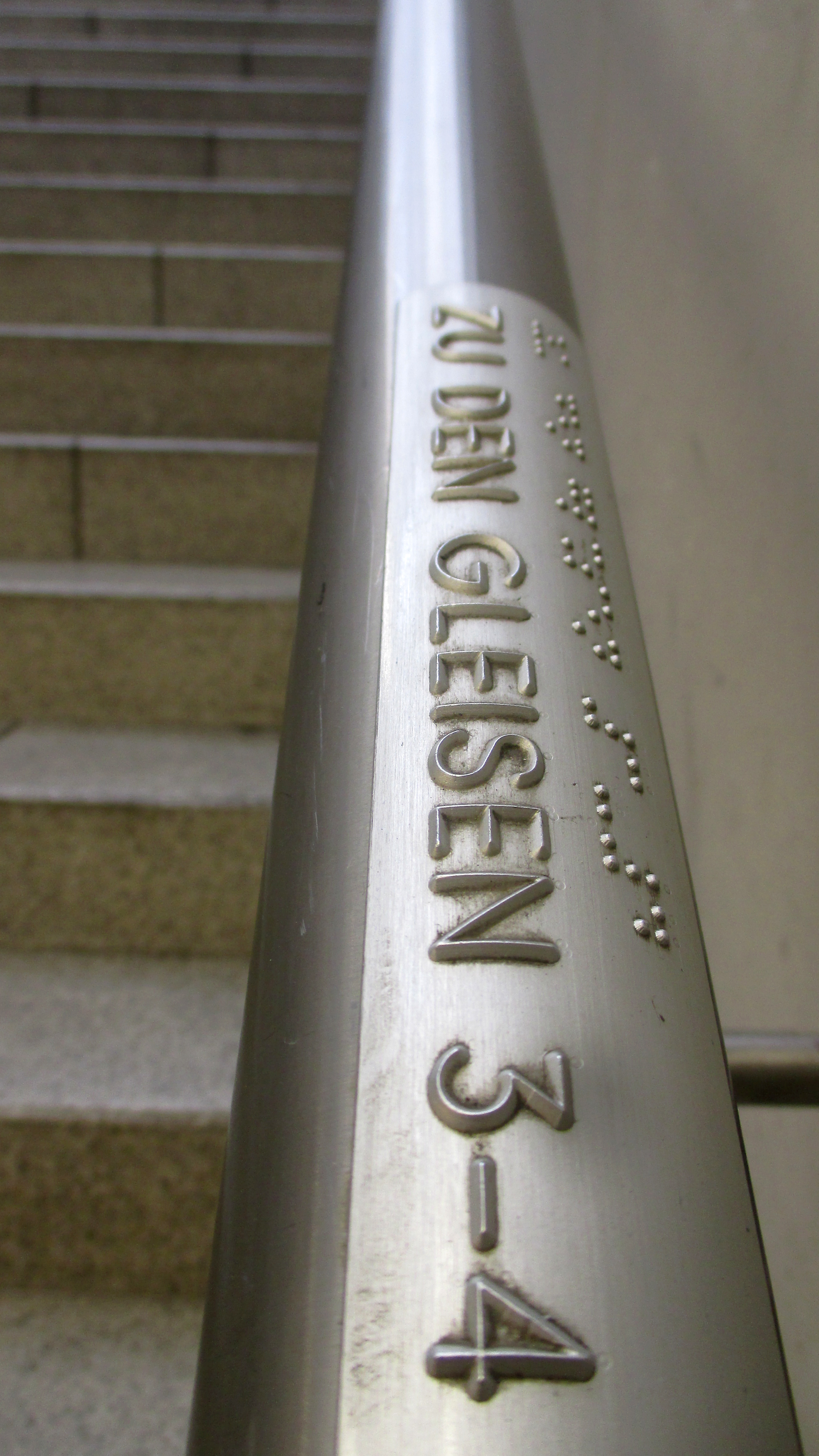 +Blindenschrift Handlauf Hauptbahnhof - (Zu den Gleise 3-4) - Bild 002